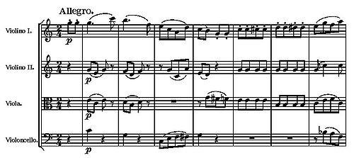 4º movimiento del Cuarteto de cuerda n.º 19 (Mozart)